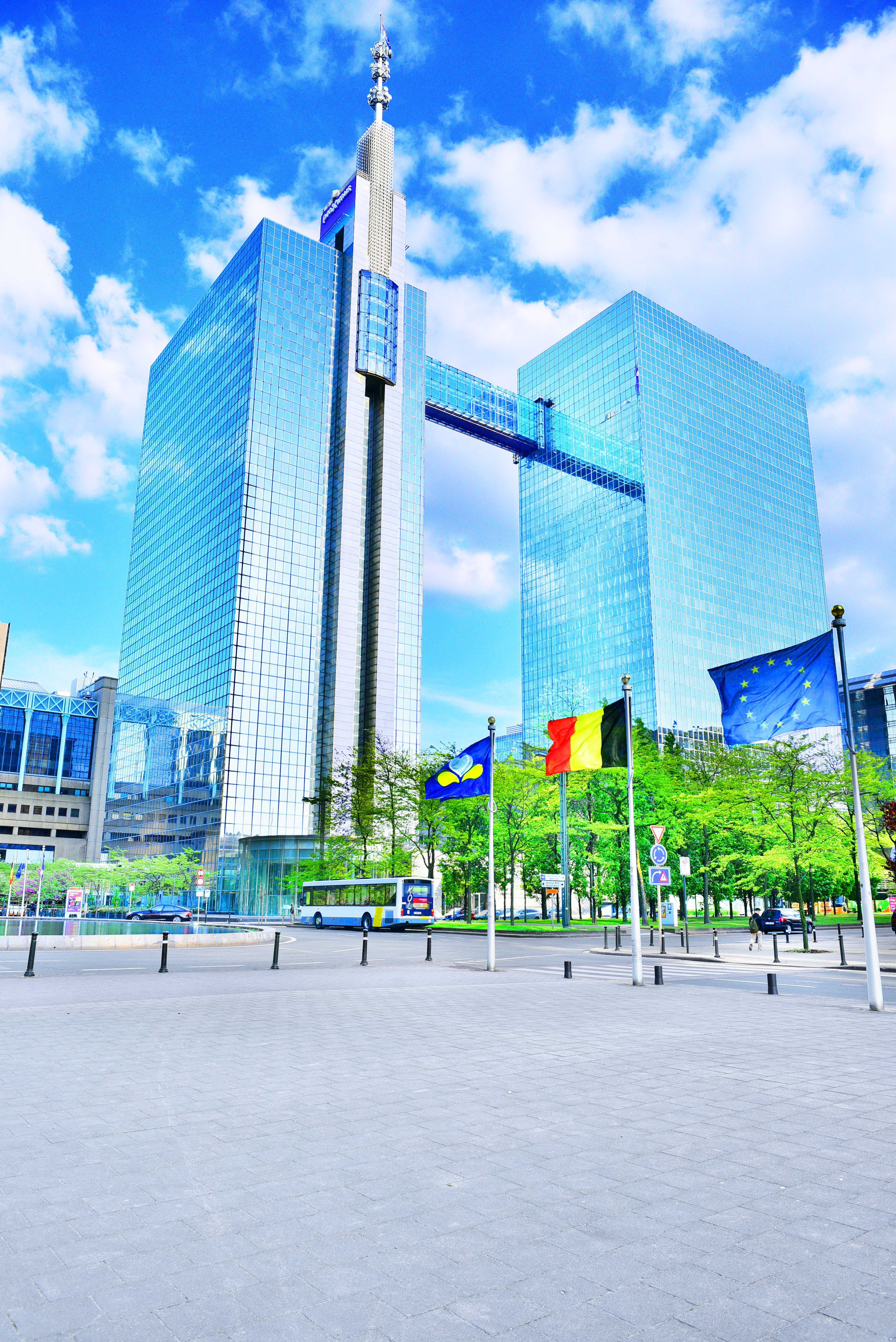 Tours Proximus